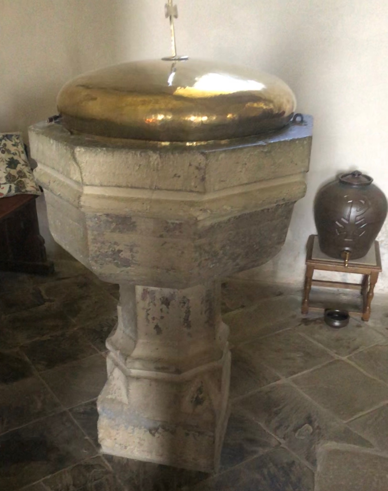 Taufstein aus Blaustein in der Kirche St. Cyriacus in Weyer, Mechernich Deutschland